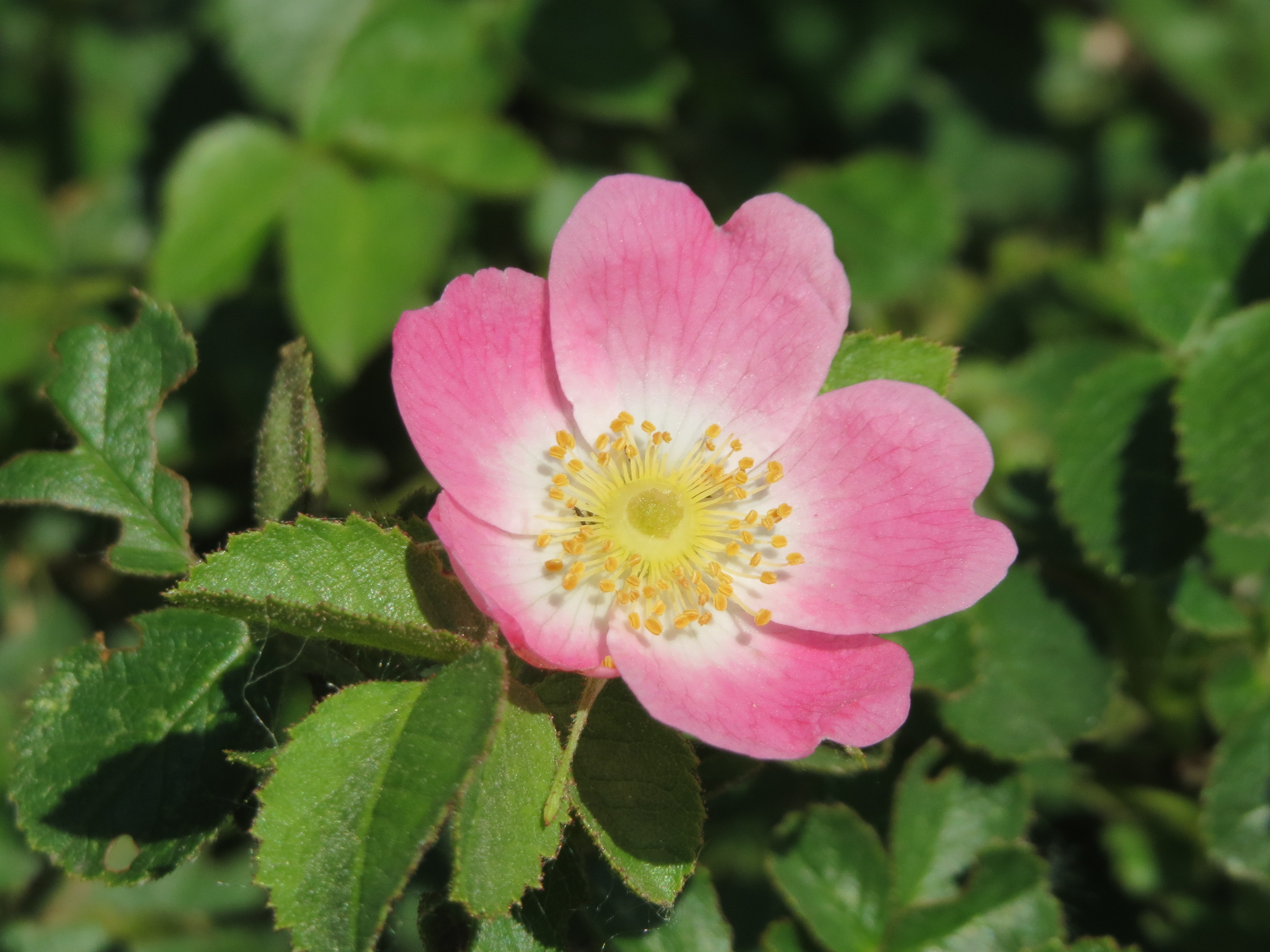 Wein-Rose (Rosa rubiginosa) bei Hockenheim